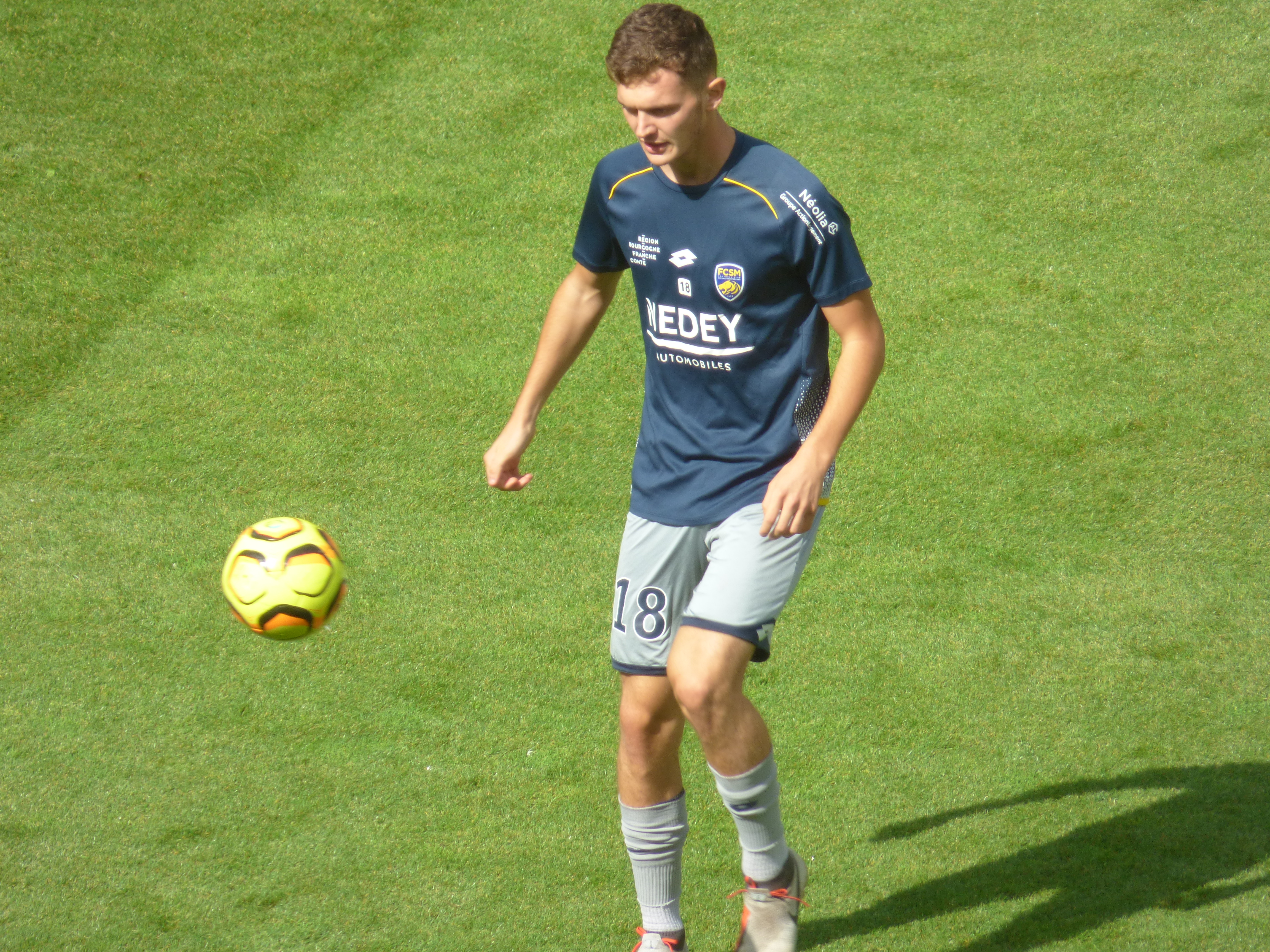 Jean Ruiz avant le match Lens / Sochaux, comptant pour la septième journée du championnat de France de football de Ligue 2, le 15 septembre 2018.